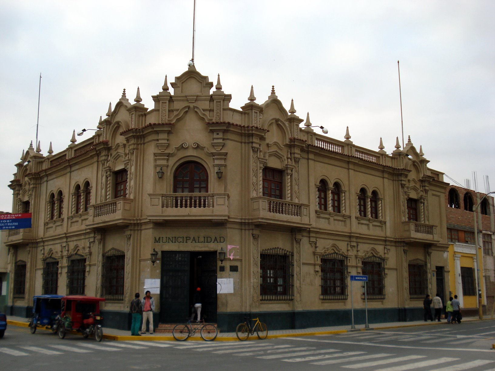 Lambayeque, Perú.